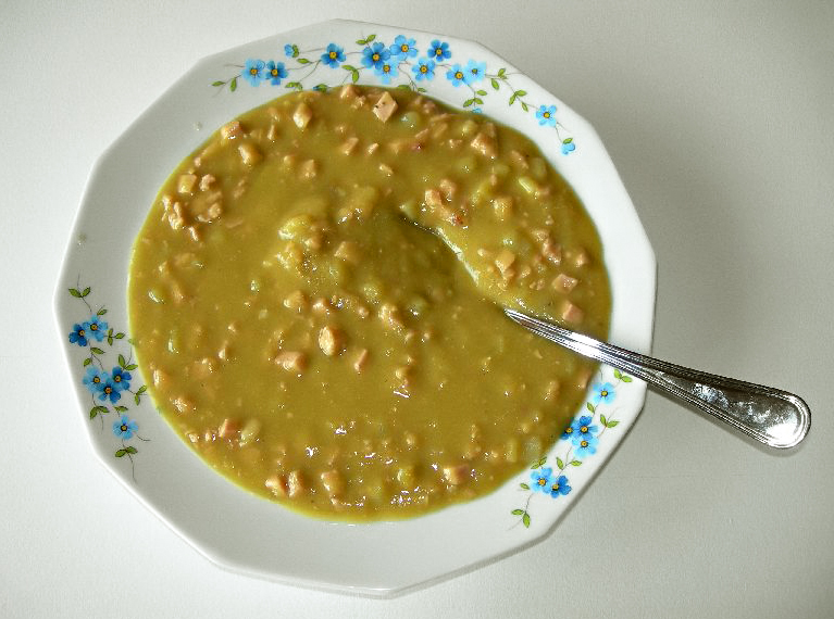 Teller Erbsensuppe, pea soup